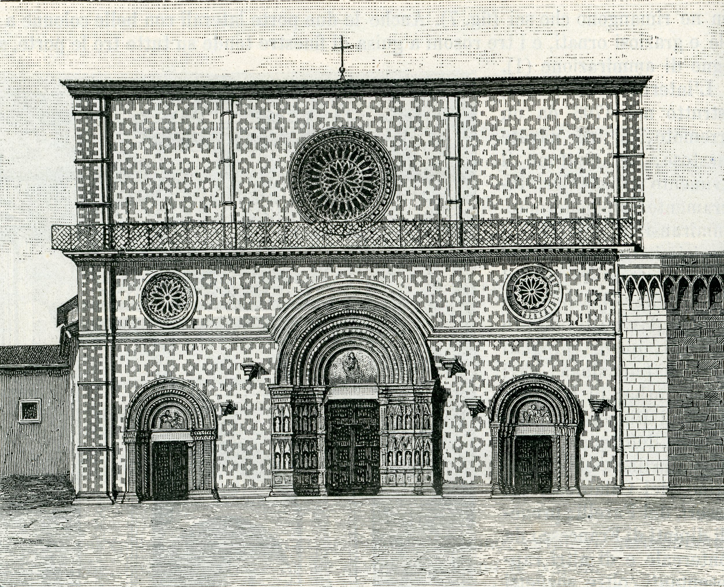 Aquila: facciata della chiesa di Santa Maria di Collemaggio (incisore anonimo 1899).